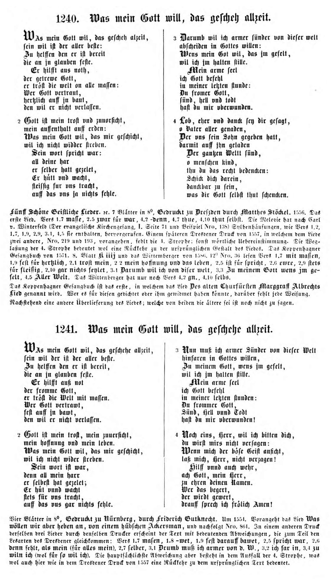 Was mein Gott will, das g'scheh allzeit, Edition der frühesten Drucke durch Philipp Wackernagel (1870)